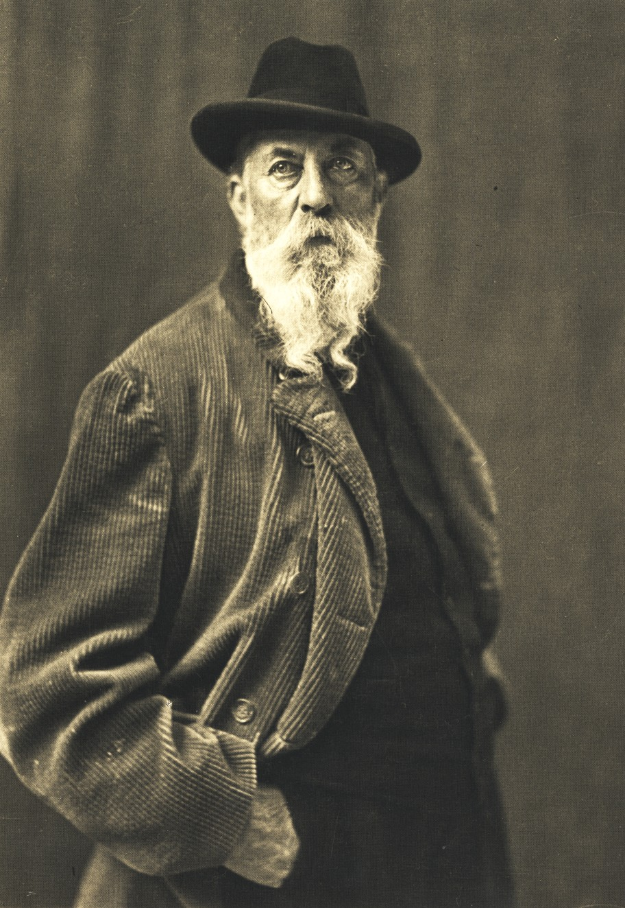 Porträt des Bildhauers und Malers Reinhold Begas.